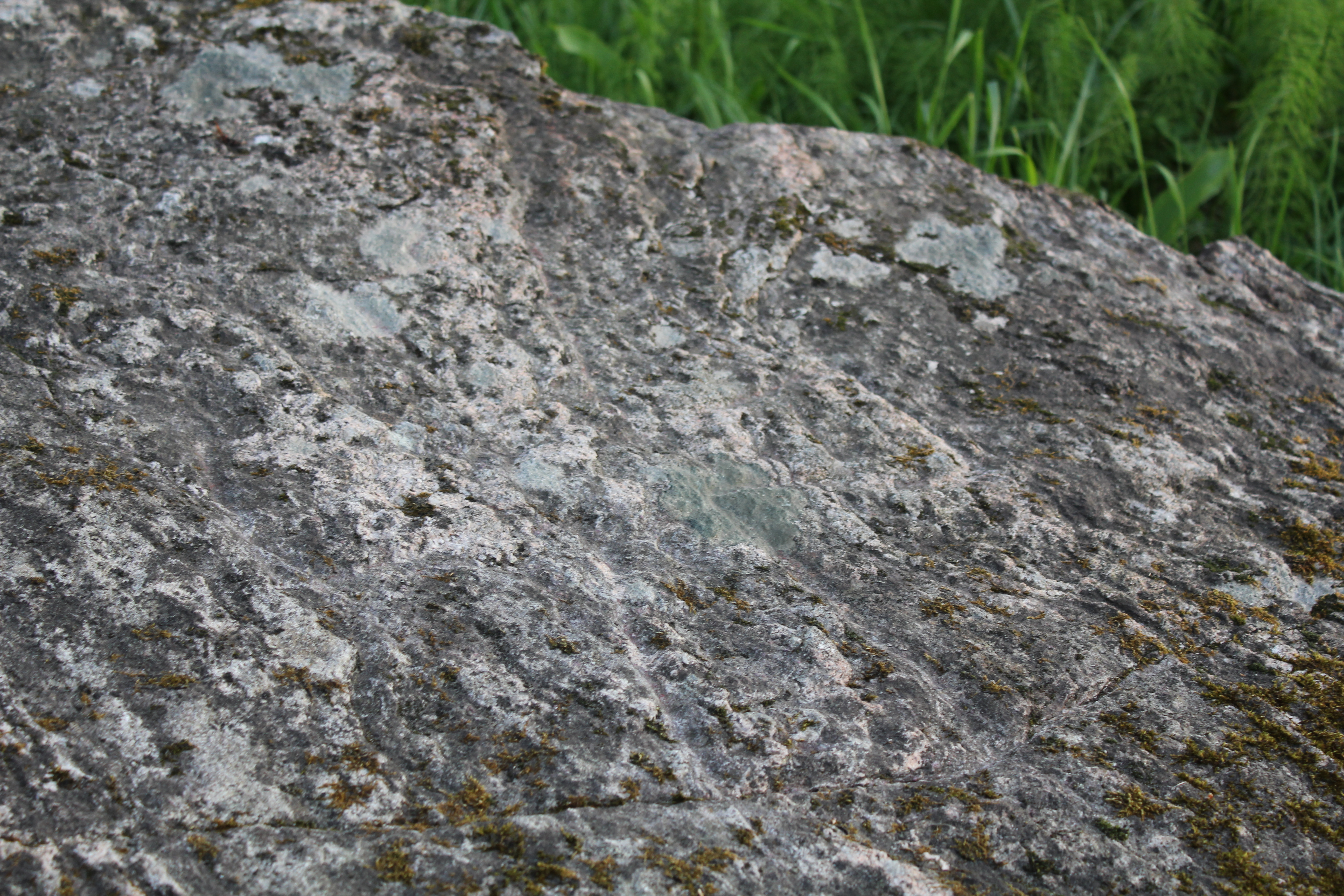 Runstenen Sö 264 i Österhaninge. Närbild på den vittrade ristningen.